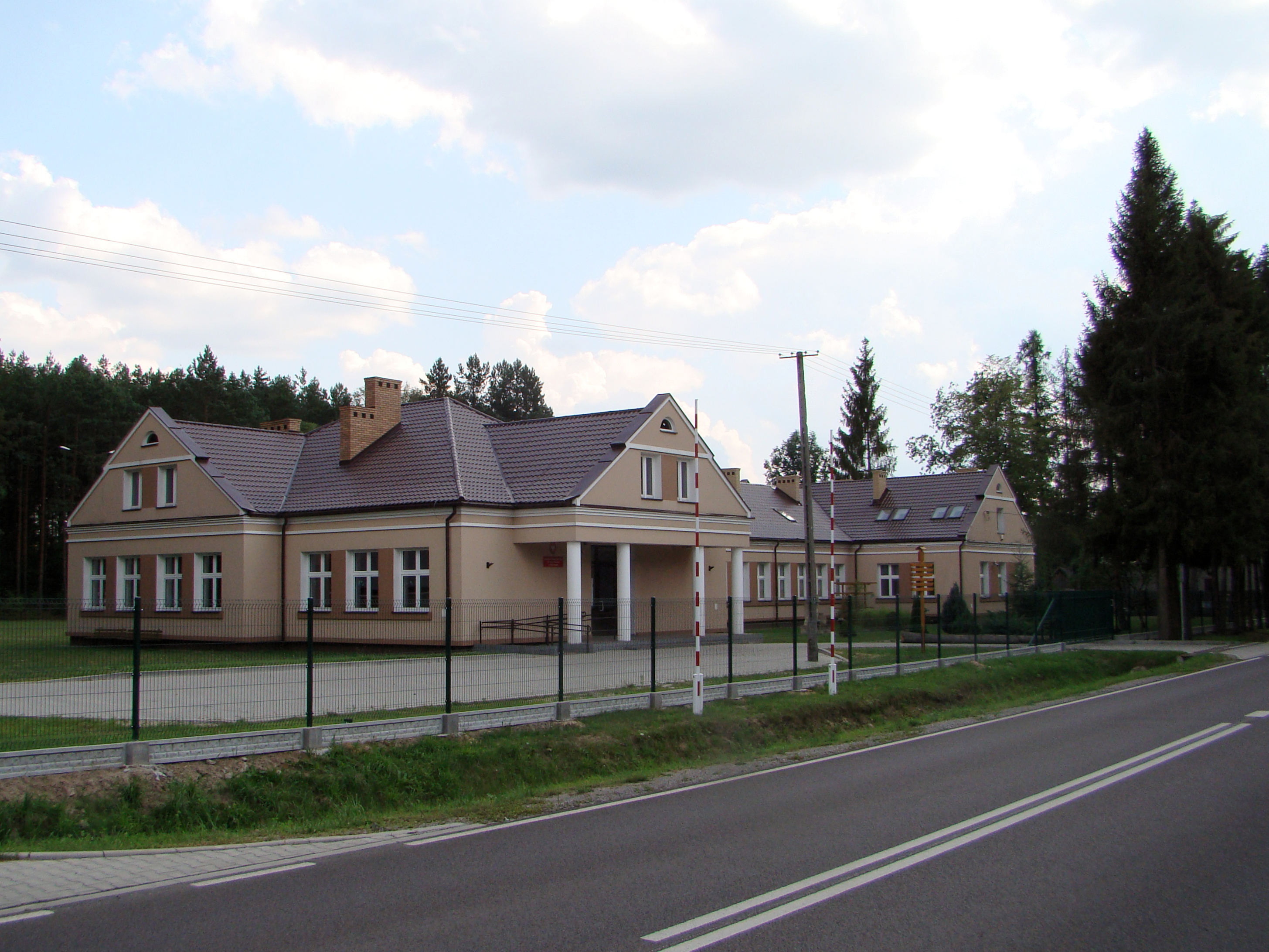 Budova školy ve vesnici Kaczórki, Polsko